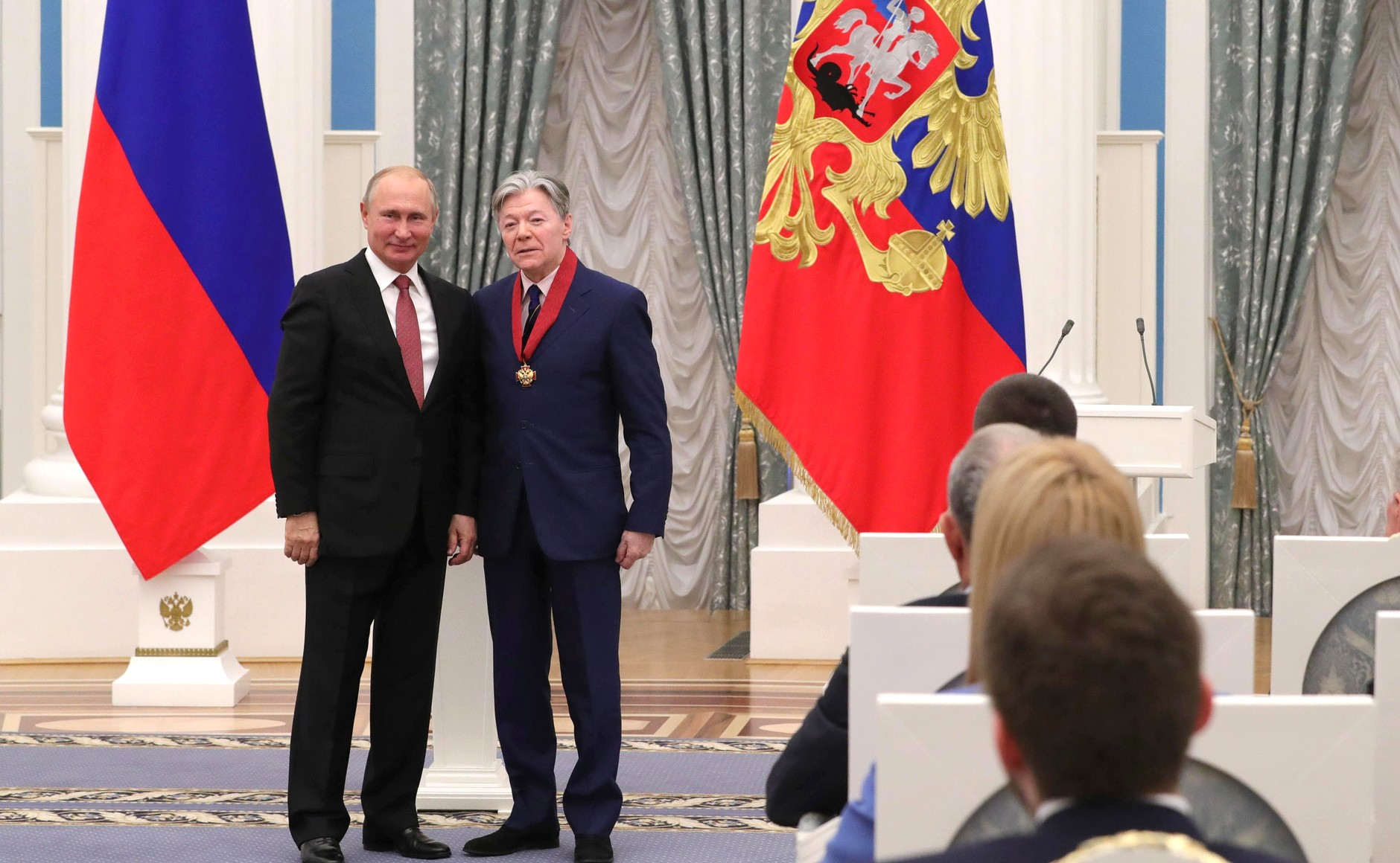 Вручение государственных наград. Орденом «За заслуги перед Отечеством» II степени награждён актёр Александр Збруев.